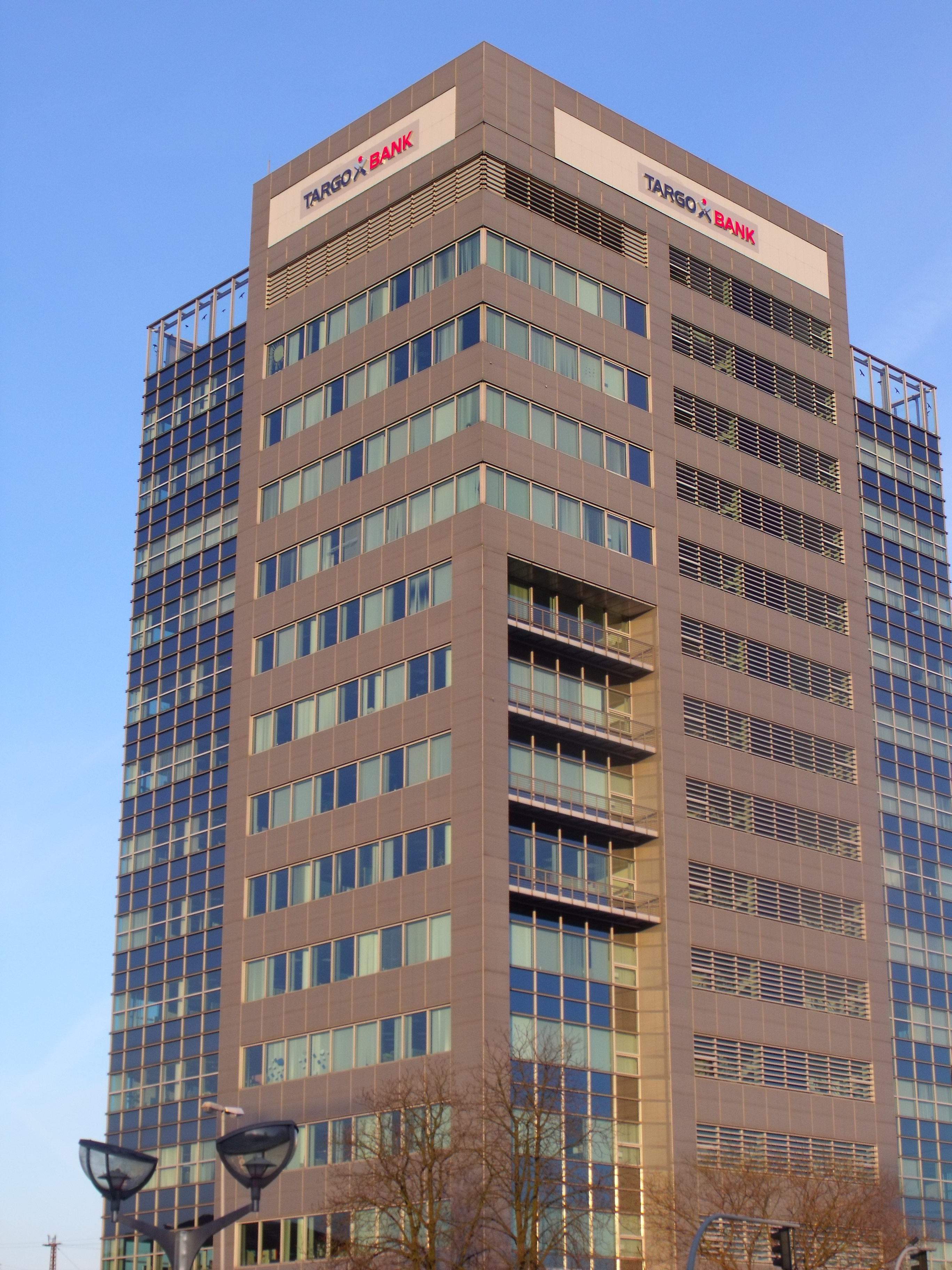 Gebäude der Targobank Duisburg